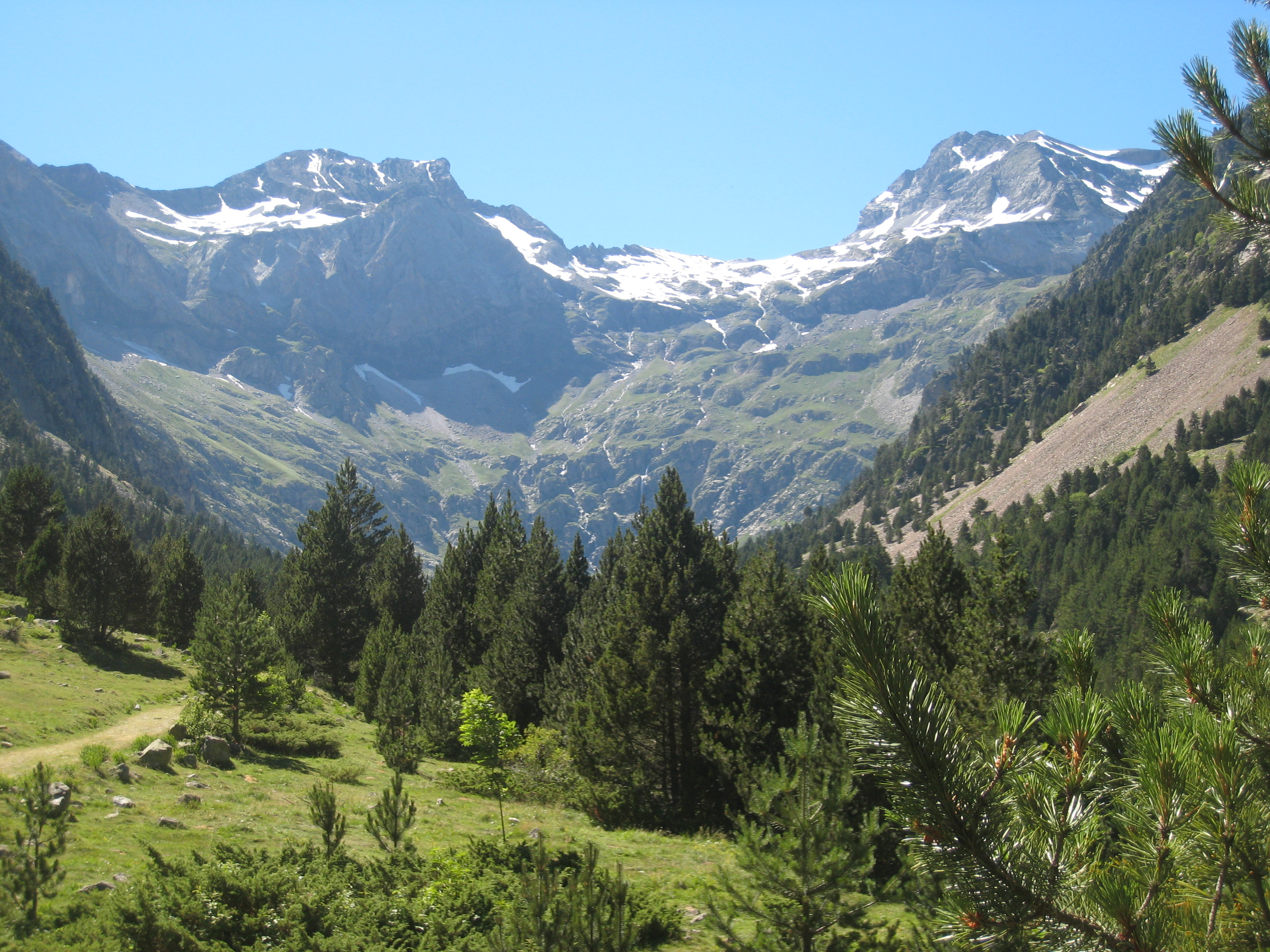 Circo de Barrosa en Aragon - A gauche le pic de la Robiñera - A droite La Munia